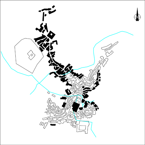 San Giovanni in Fiore - sviluppo centro storico Fase V